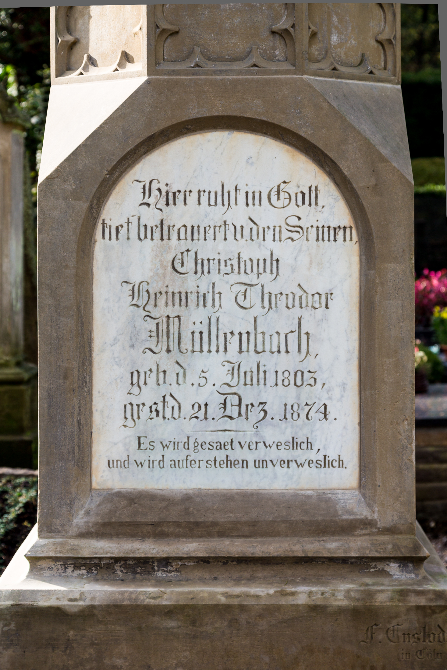 Rösrath, Denkmalnummer 65, Müllenbach-Grabmal, Christoph Heinrich nach der Renovierung im Jahr 2013. Bildhauer: F. Custodis This is a photograph of an architectural monument.